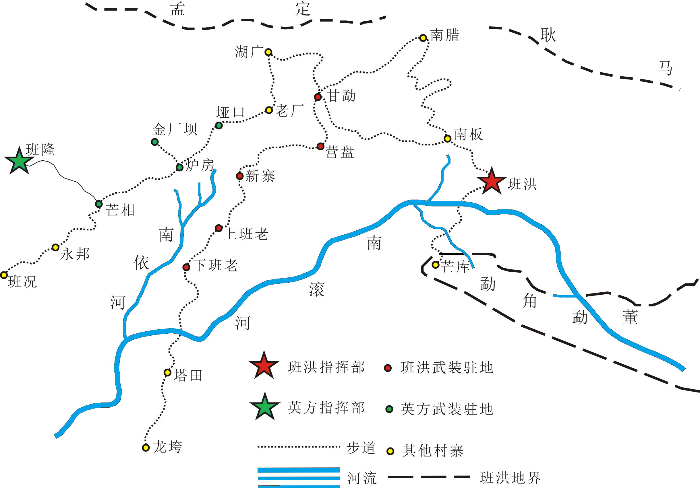 中文（中国大陆）: 班洪抗英地势略图，参考《沧源佤族自治县志》P647绘制